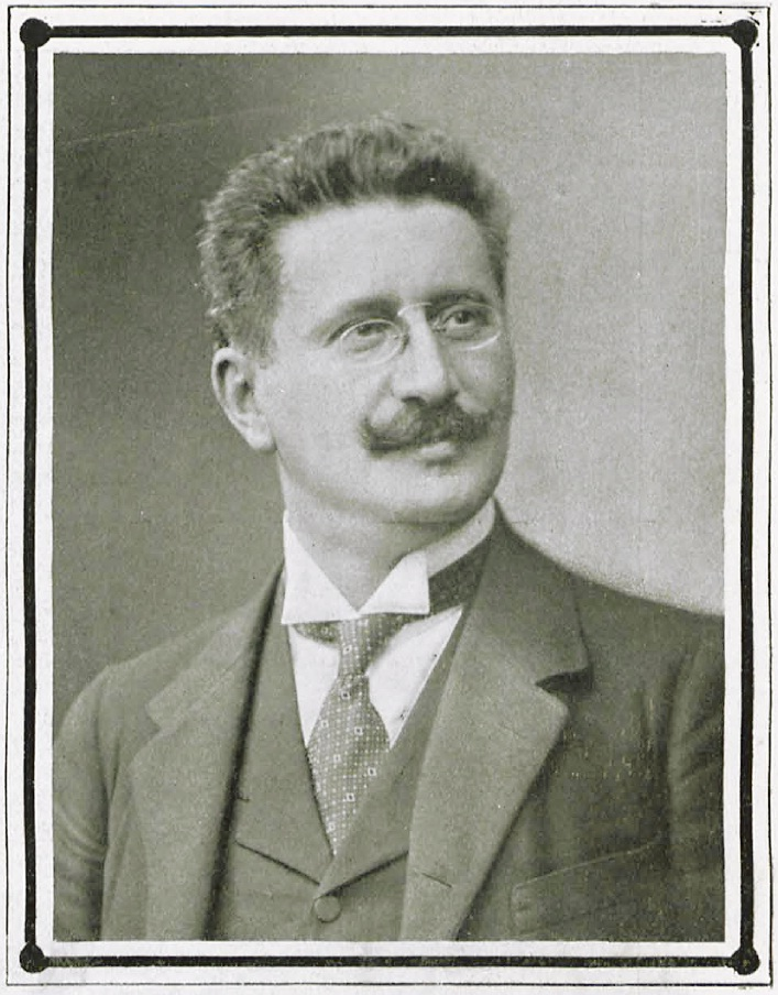 Gustav Kadelburg (1851-1925), ungarisch-österreichischer Schauspieler und Autor.